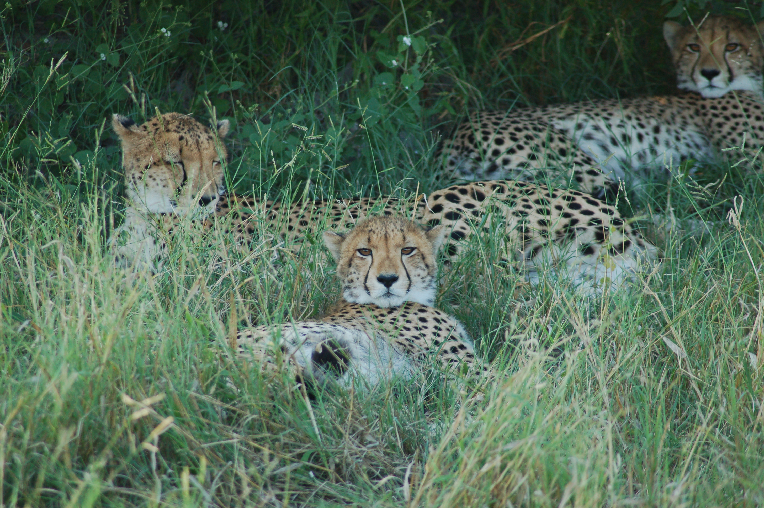 Okavango Delta, Botwana